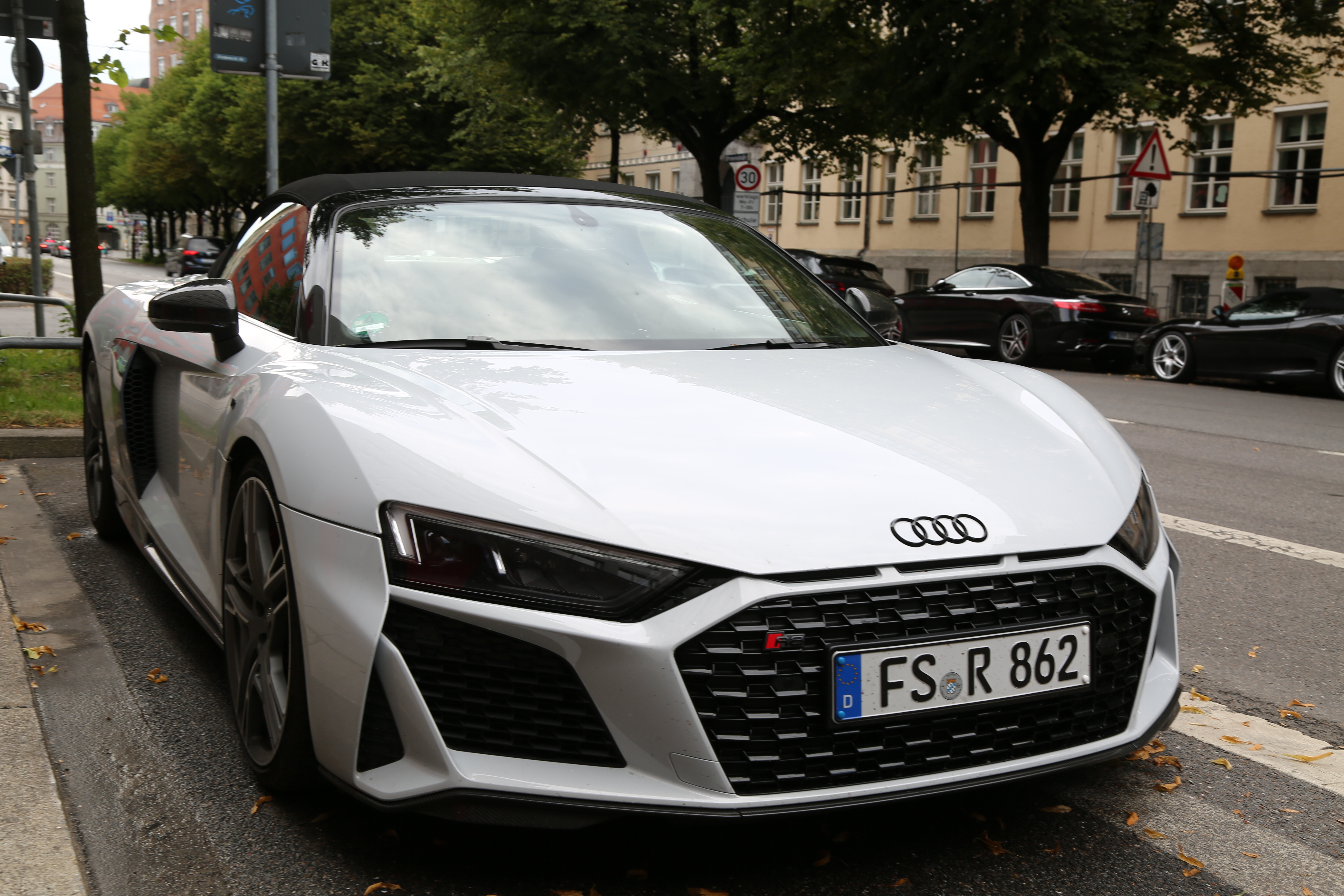 Audi R8 V10 Spyder Facelift von 2019